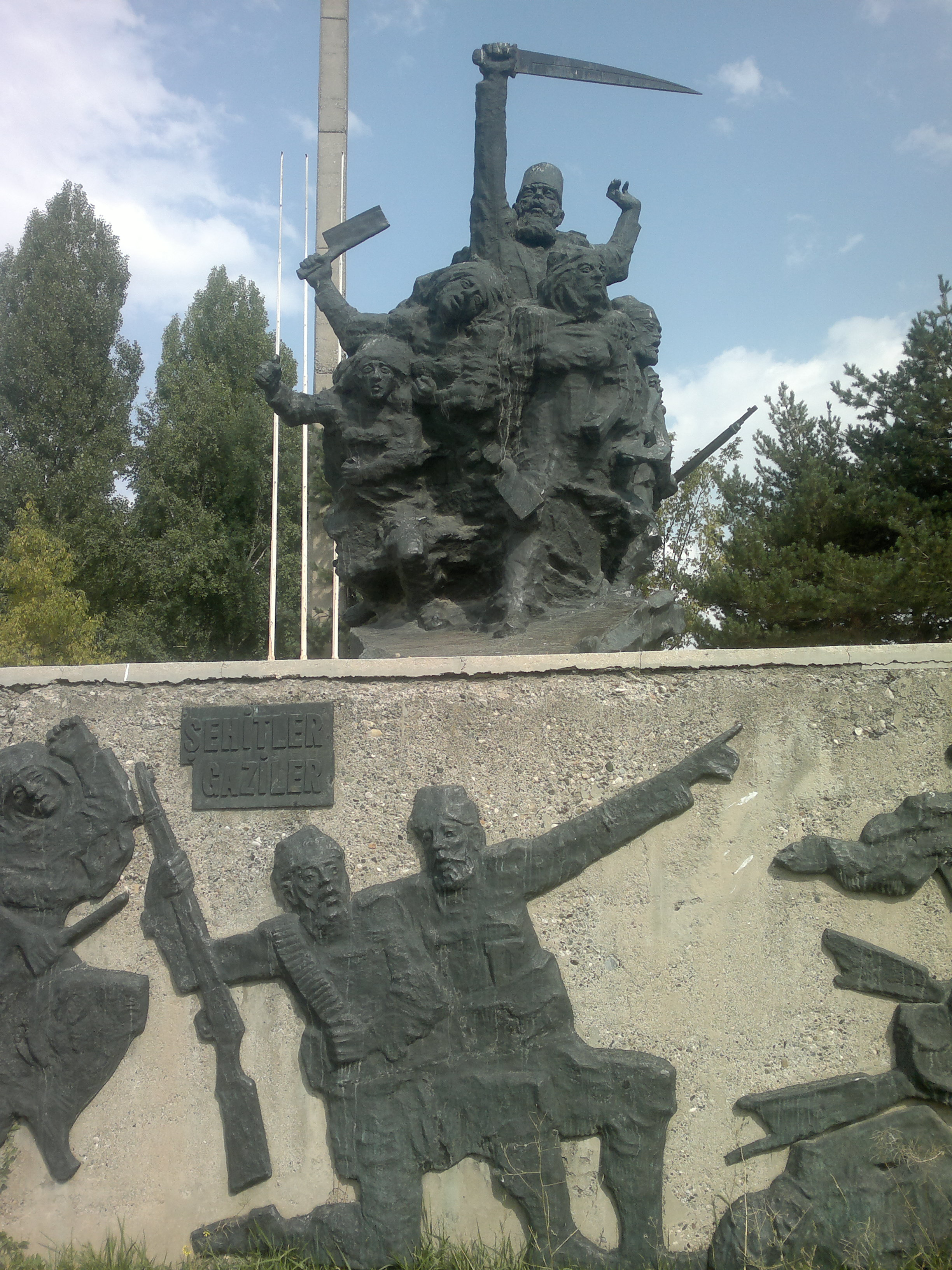 Türkiye'de Erzurum ili şehir merkezi girişindeki Erzurum Özgürlük Anıtı